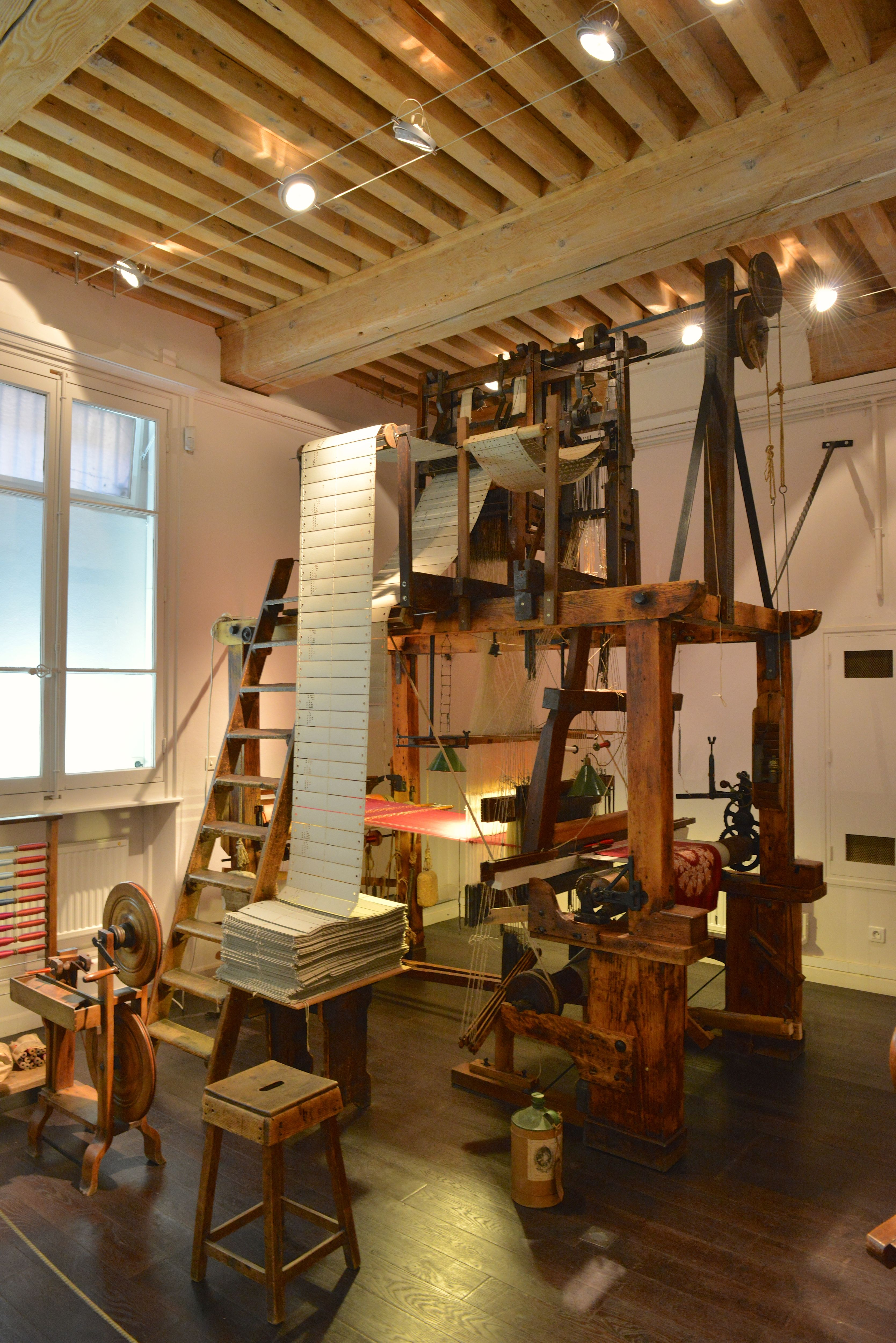 Maison des canuts-37 métier jacquard